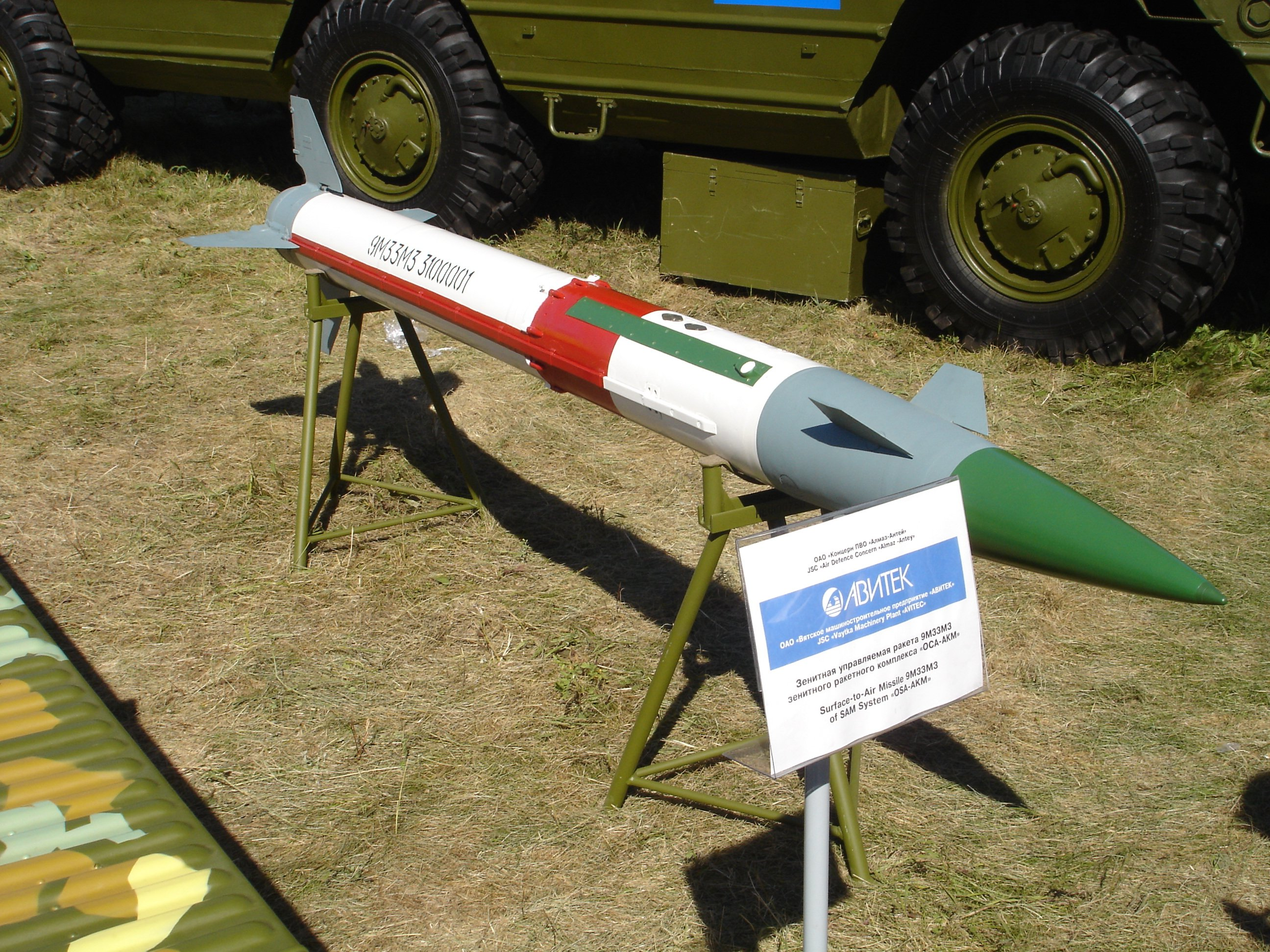 9K33M3 "Osa-AKM" SAM system 9M33M3 missile MAKS, Zhukovskiy, 2005.